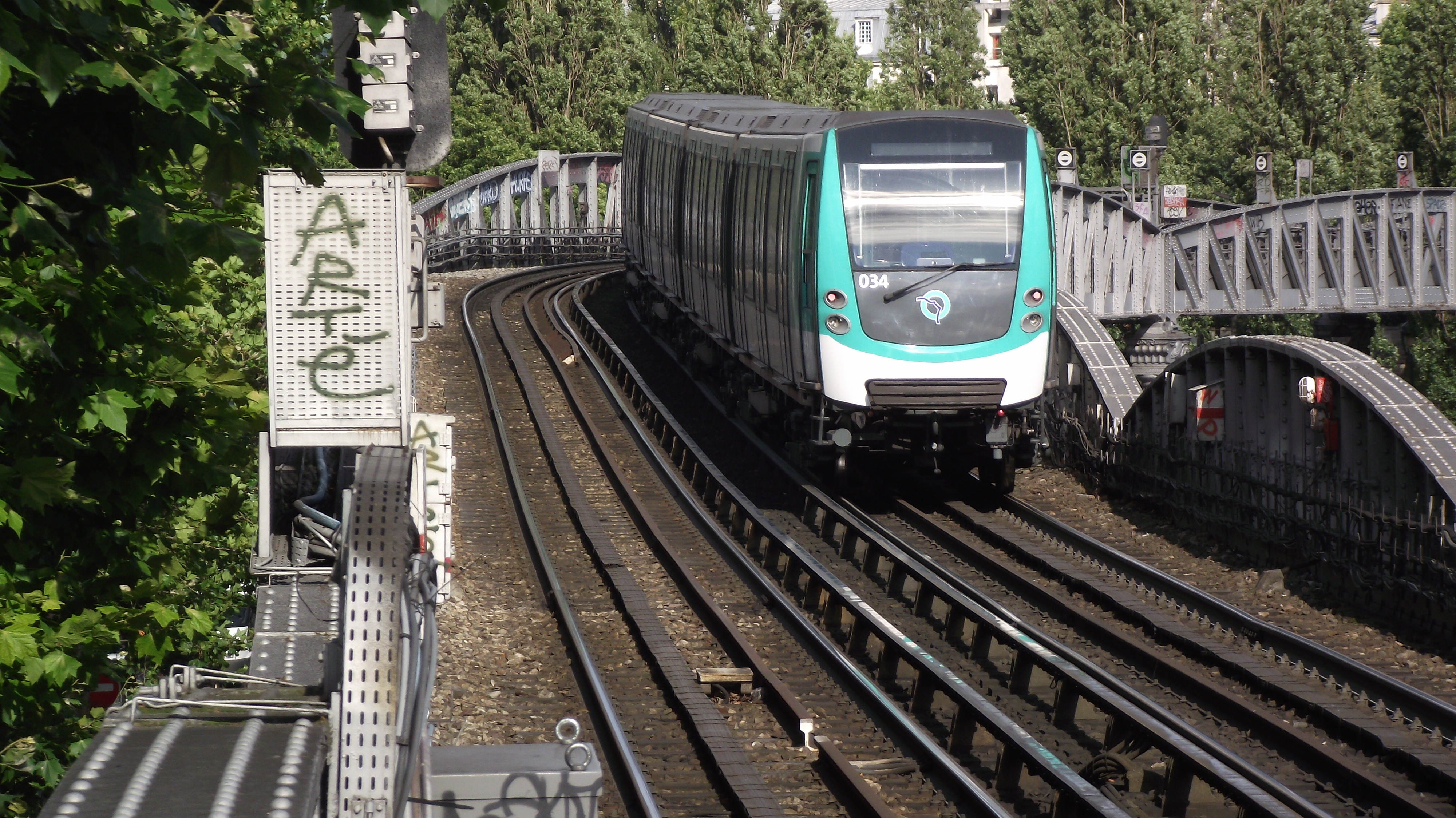 MF 2000 metrotrein op het viaduct voor station Stalingrad